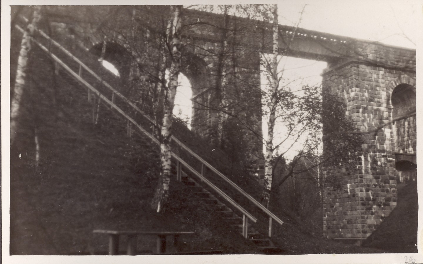 Tuderna raudteesild